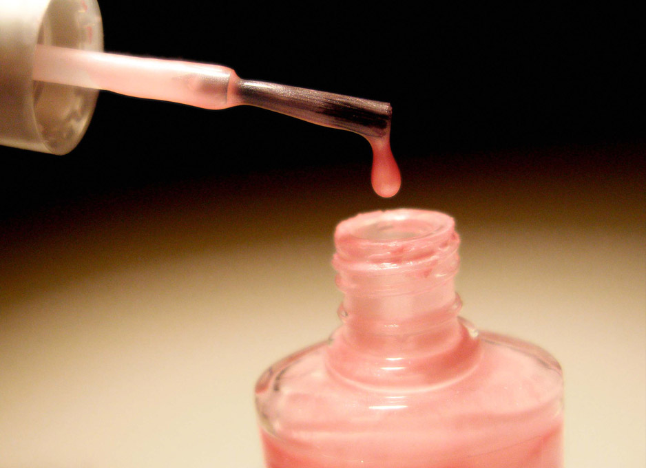 Pink nail polish.